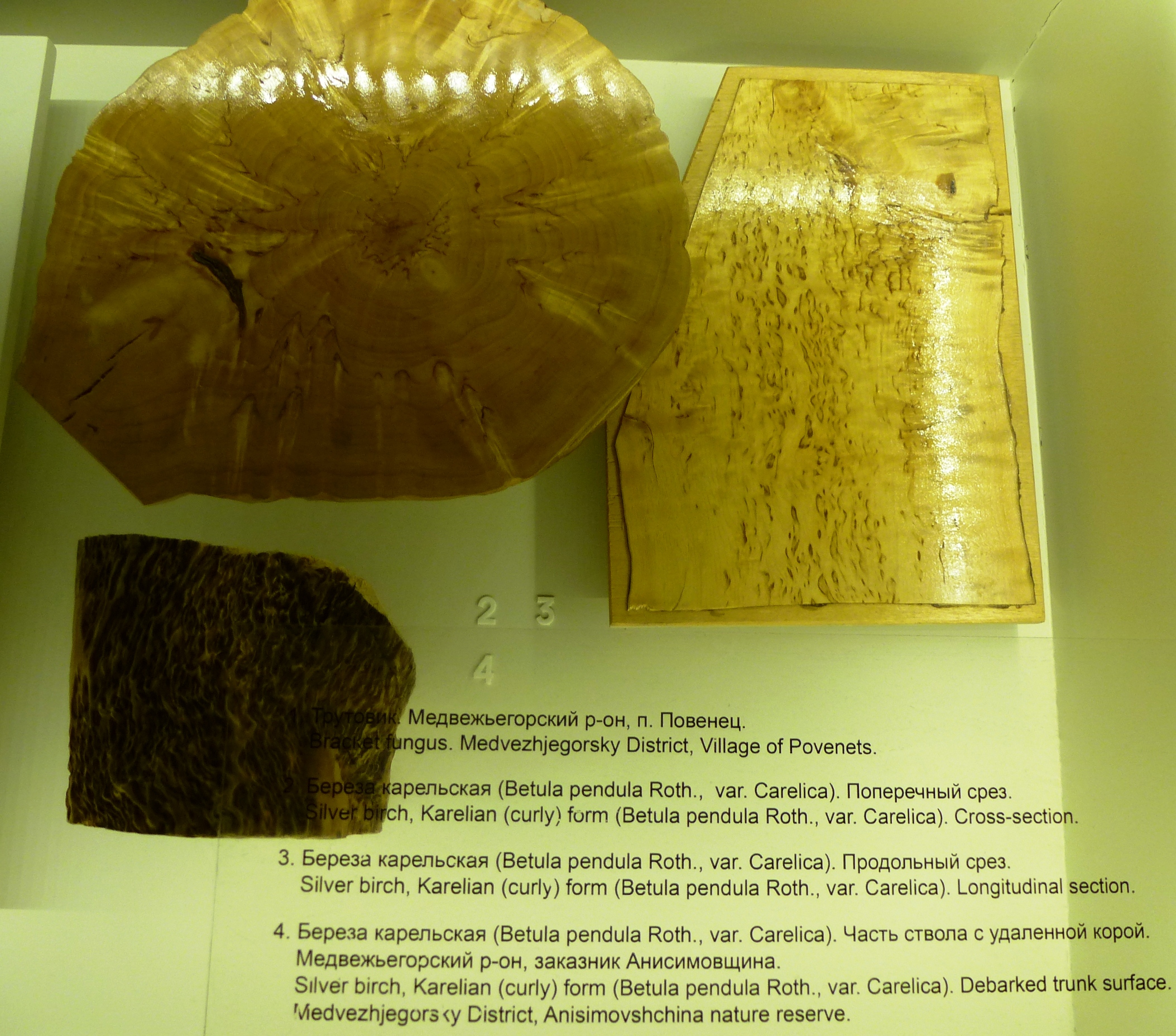 Образцы карельской берёзы.(источник - Национальный музей Республики Карелия, Петрозаводск)